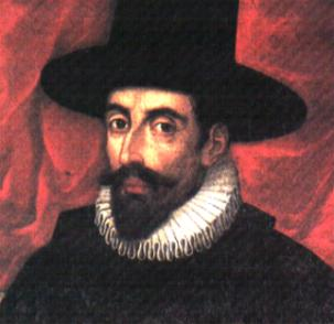 Francisco Álvarez de Toledo, Spanish viceroy of Peru